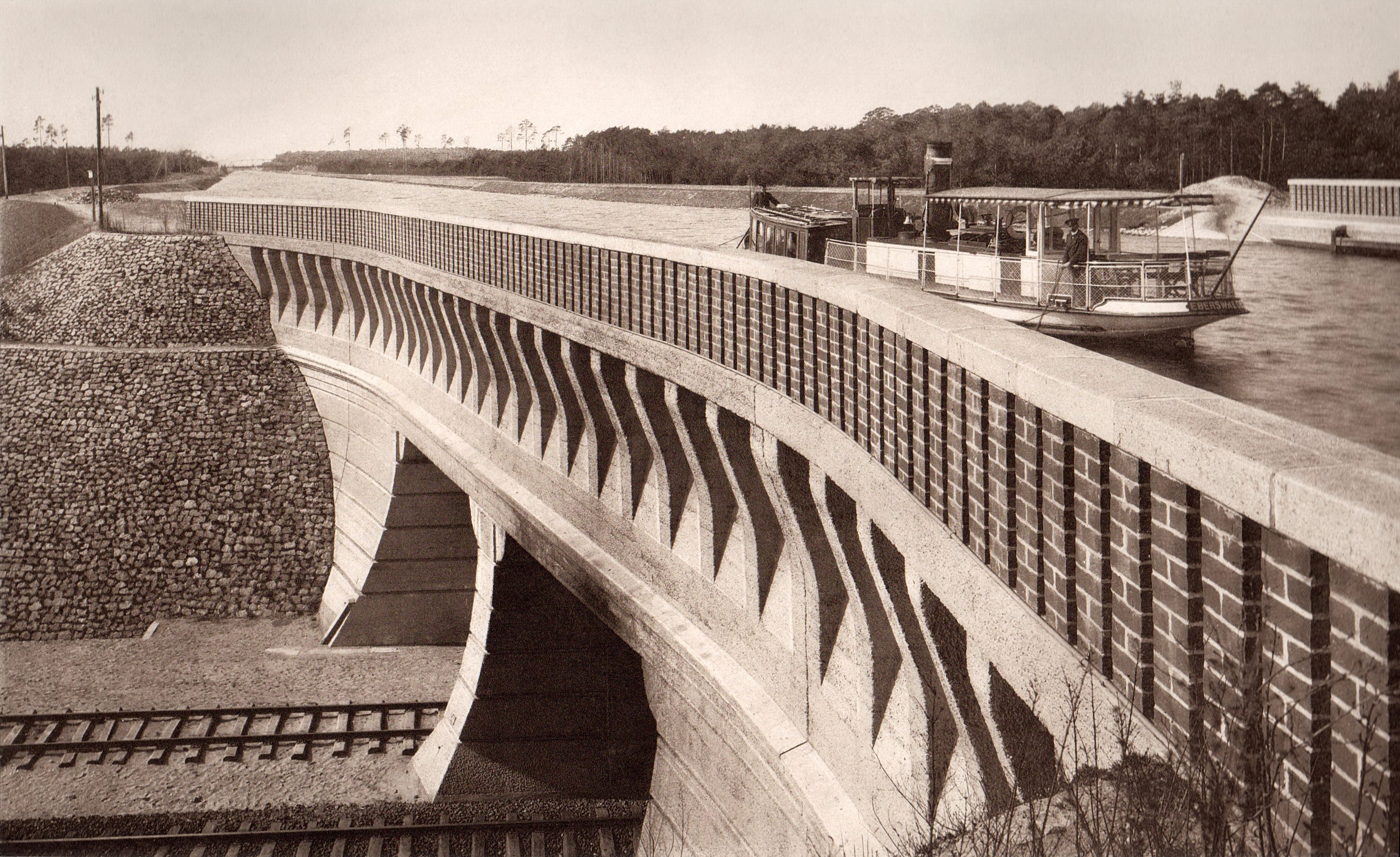 Die ehemalige Kanalbrücke des Oder-Havel-Kanals bei Eberswalde um 1914